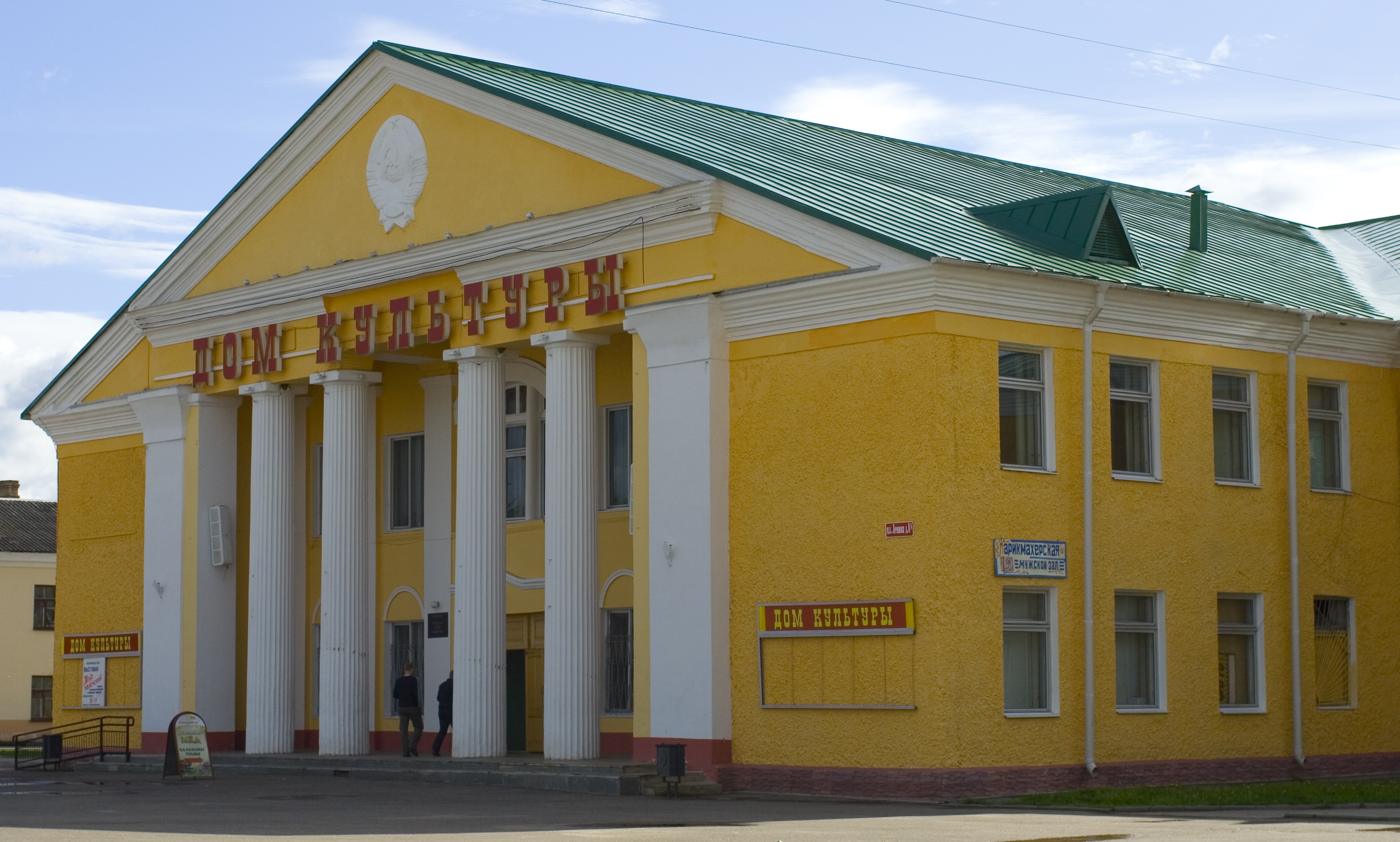 Дом культуры в Рославле